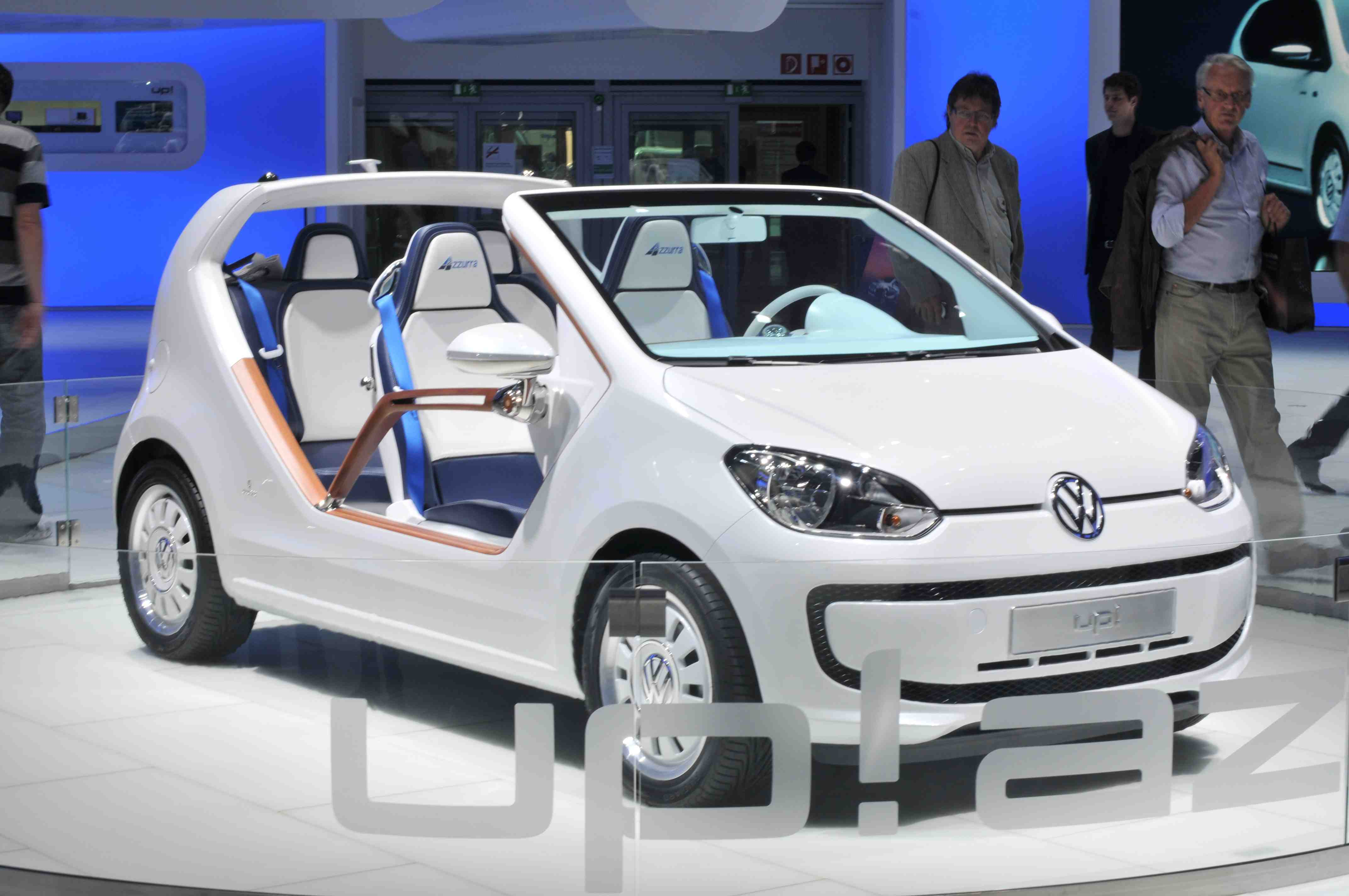 IAA 2011 - Internationale Automobilausstellung in Frankfurt/Main